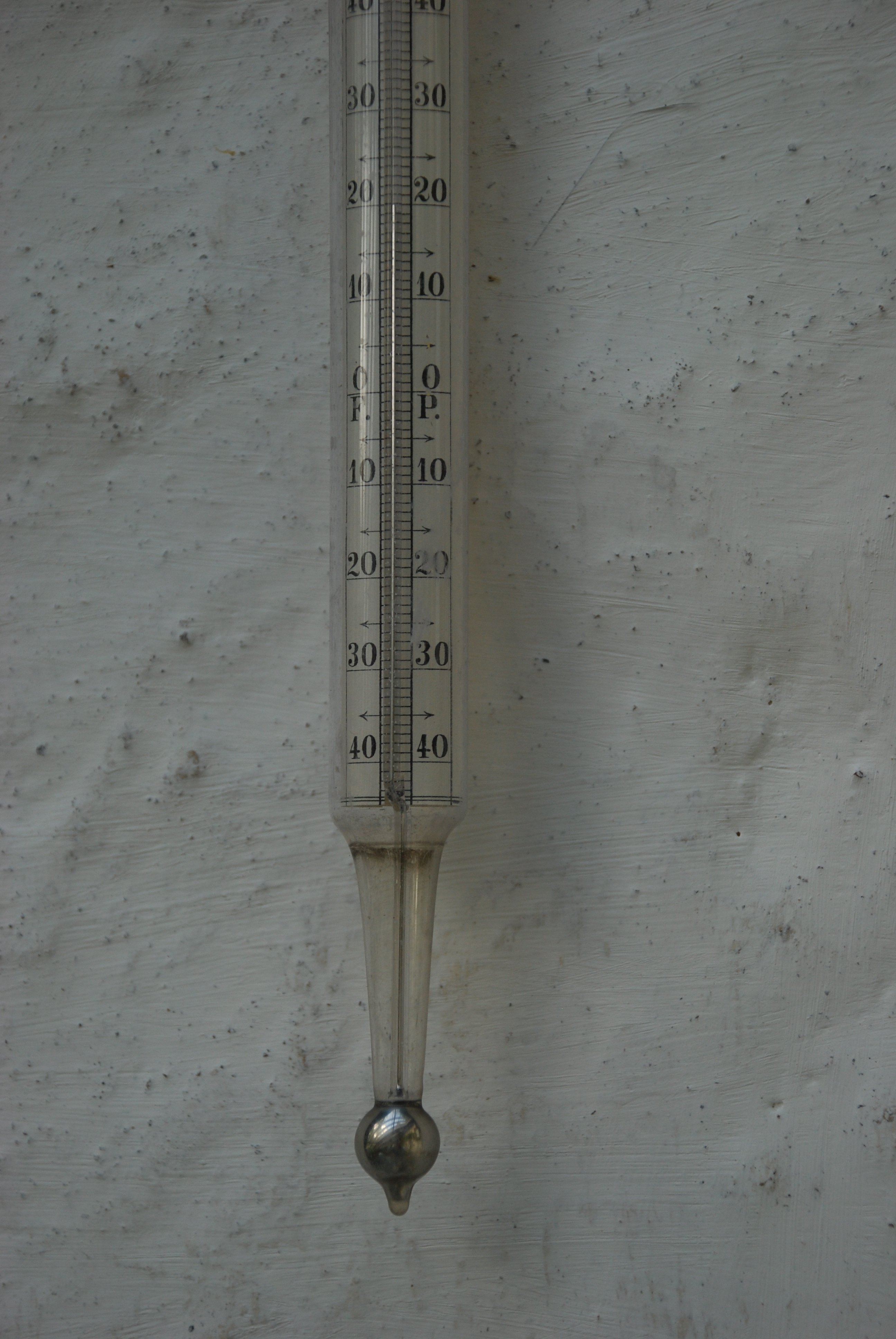 Quicksilvertermometer i växthuset i Osaby